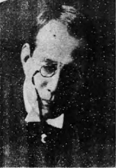 山本嘉一、1923年の写真